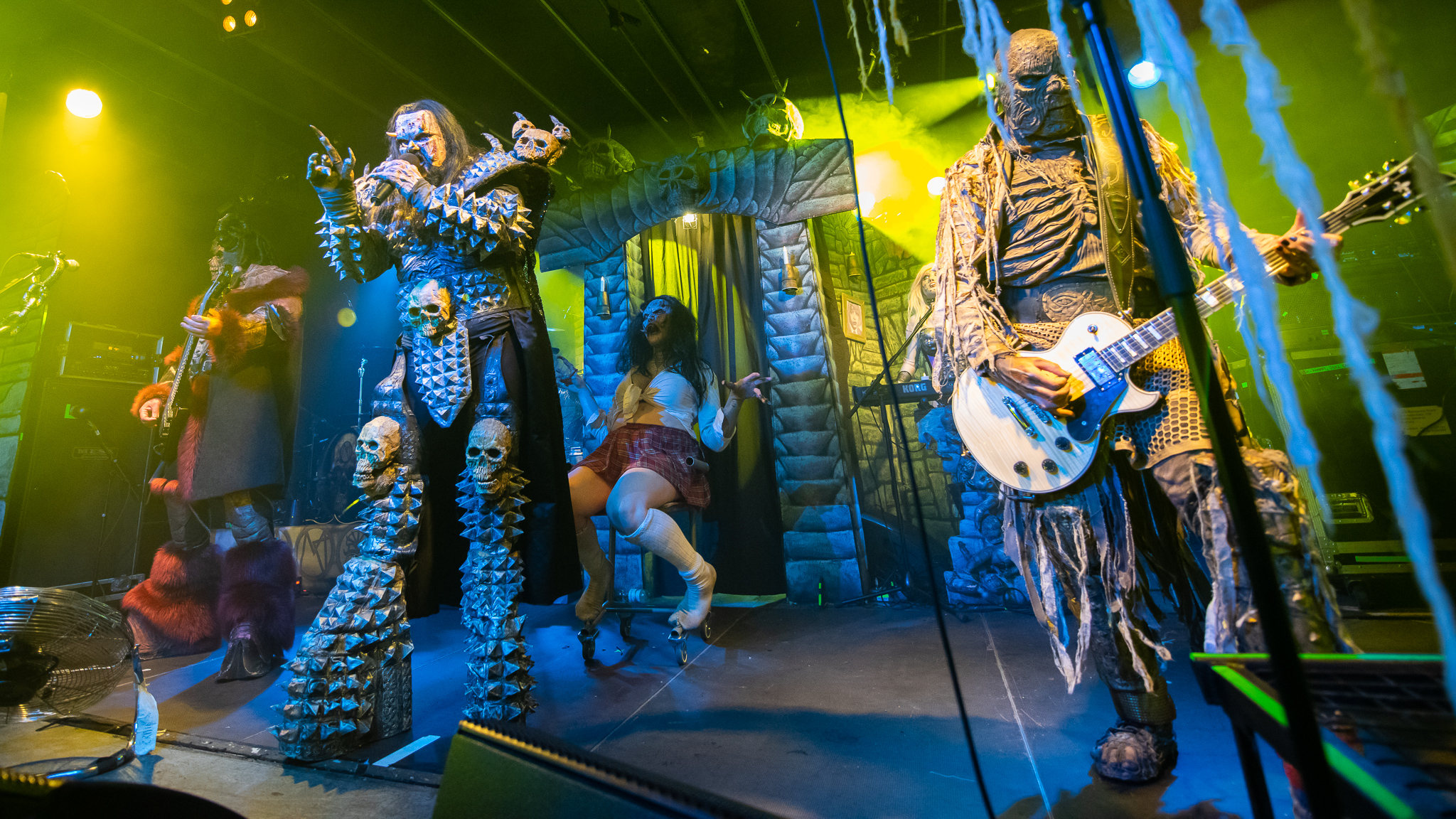 Amen,Concertbüro Franken,Der Hirsch,Jussi Antero Sydänmaa,Konzert,Livekonzert,Livemusik,Lordi,Mr. Lordi,Musik,OX,Samer el Nahhal,Tomi Petteri Putaansuu